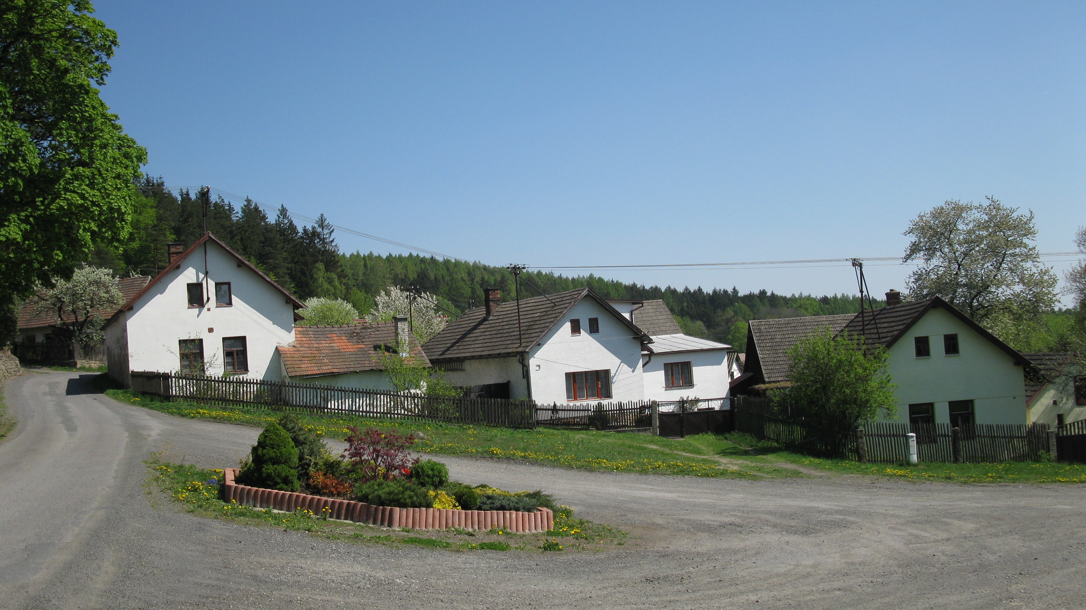 Náves v Beneticích